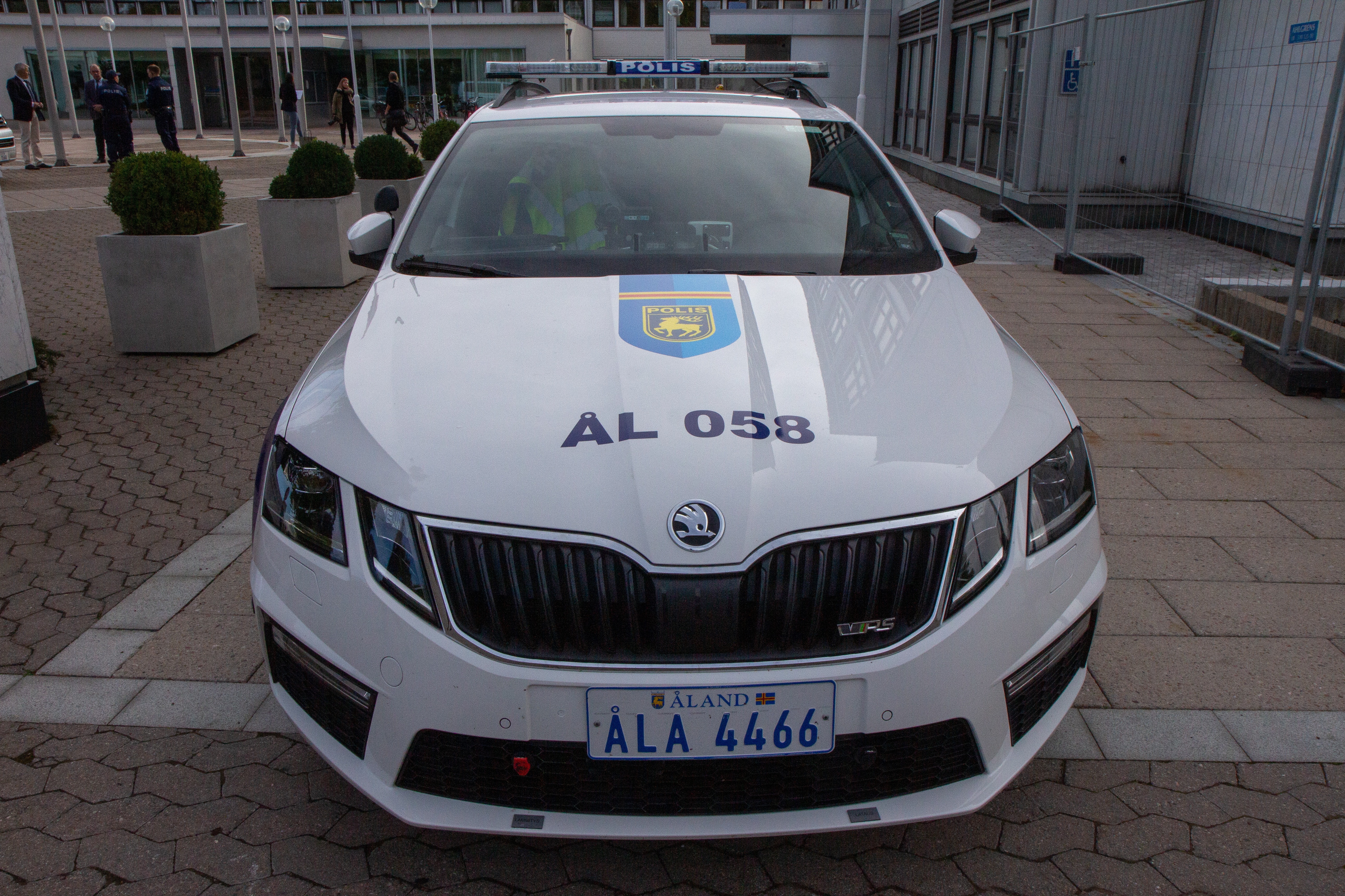 Fototour auf den Åland im Rahmen der Ostseeparlamentarierkonferenz Ende August 2018.